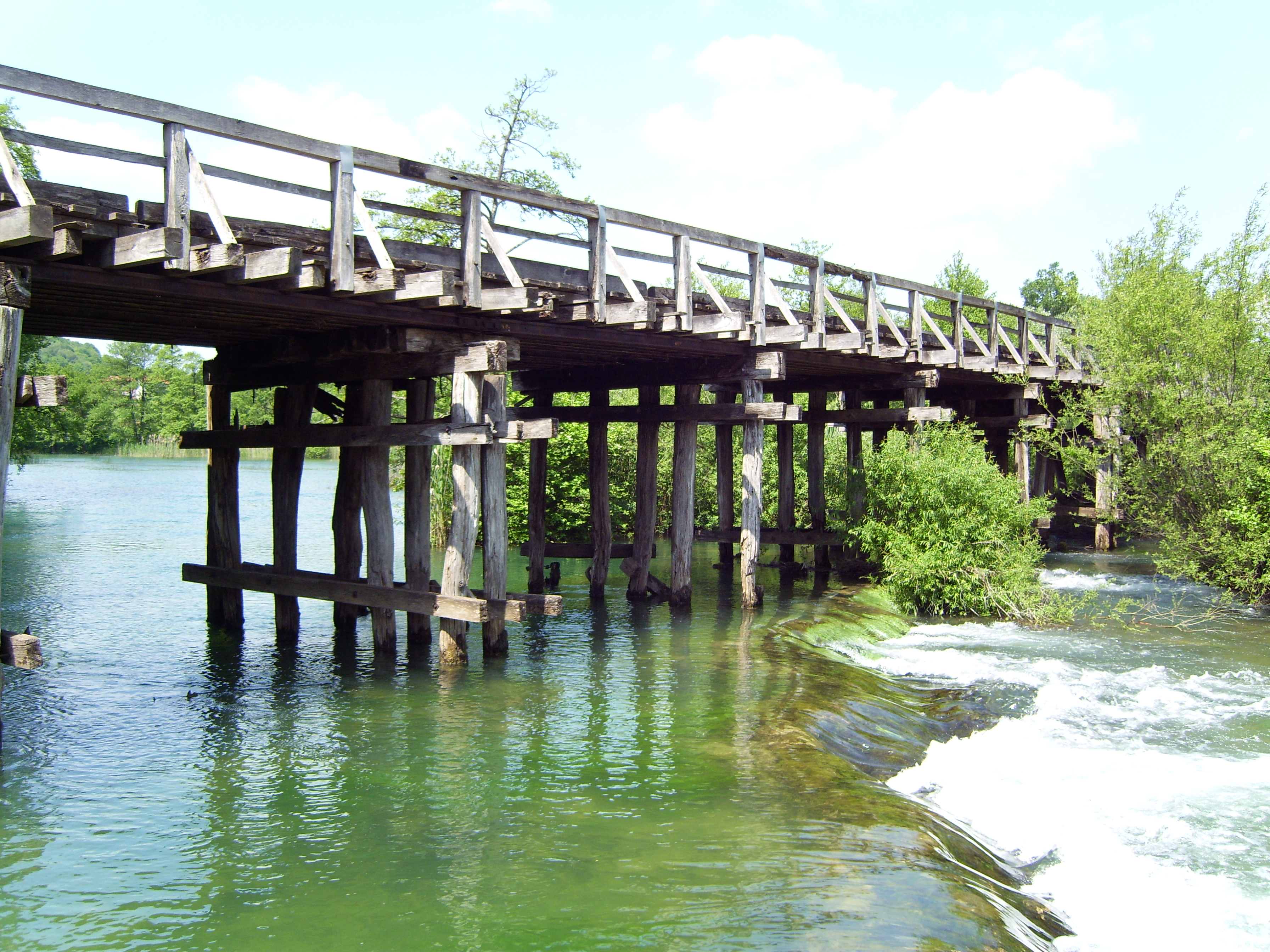 Brücke Mreznica